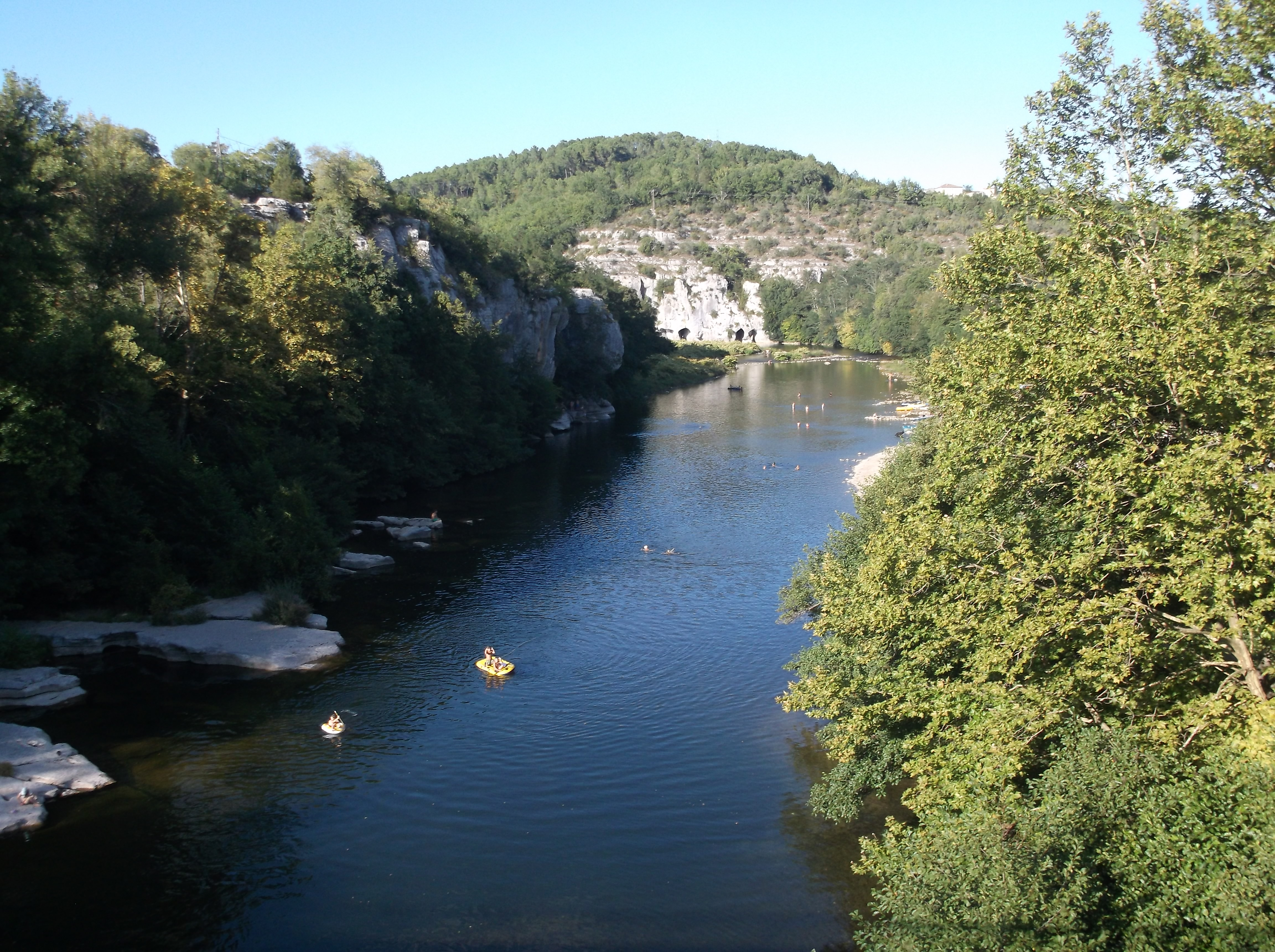 Au niveau de Casteljau (07)